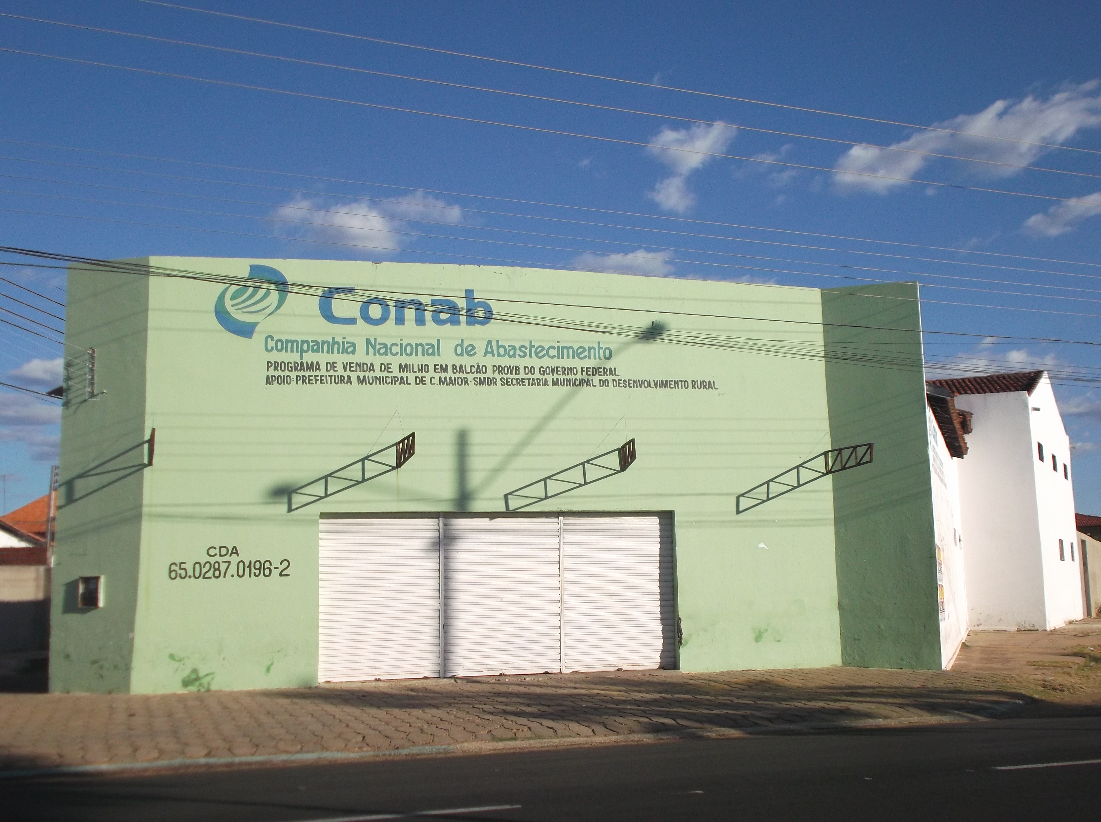 Posto da CONAB em Campo Maior, no Piauí.